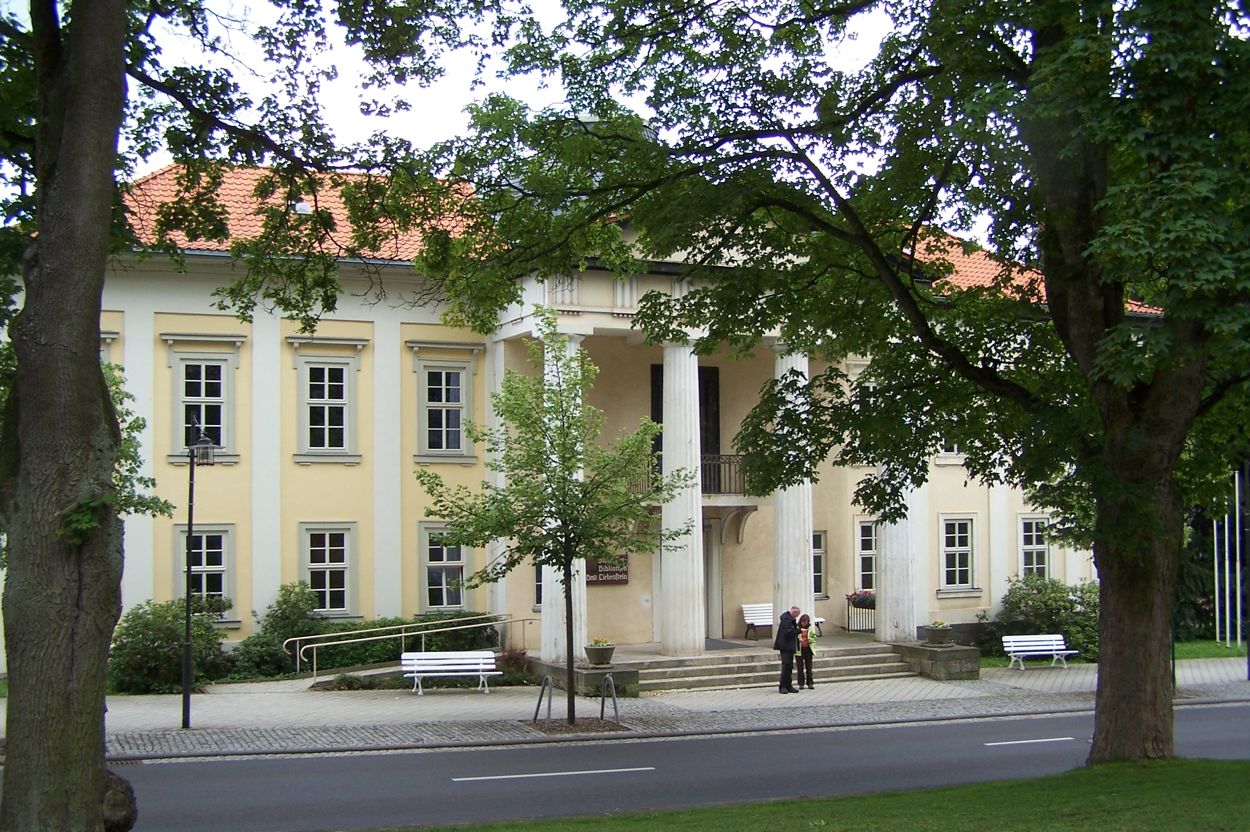 Bad Liebenstein